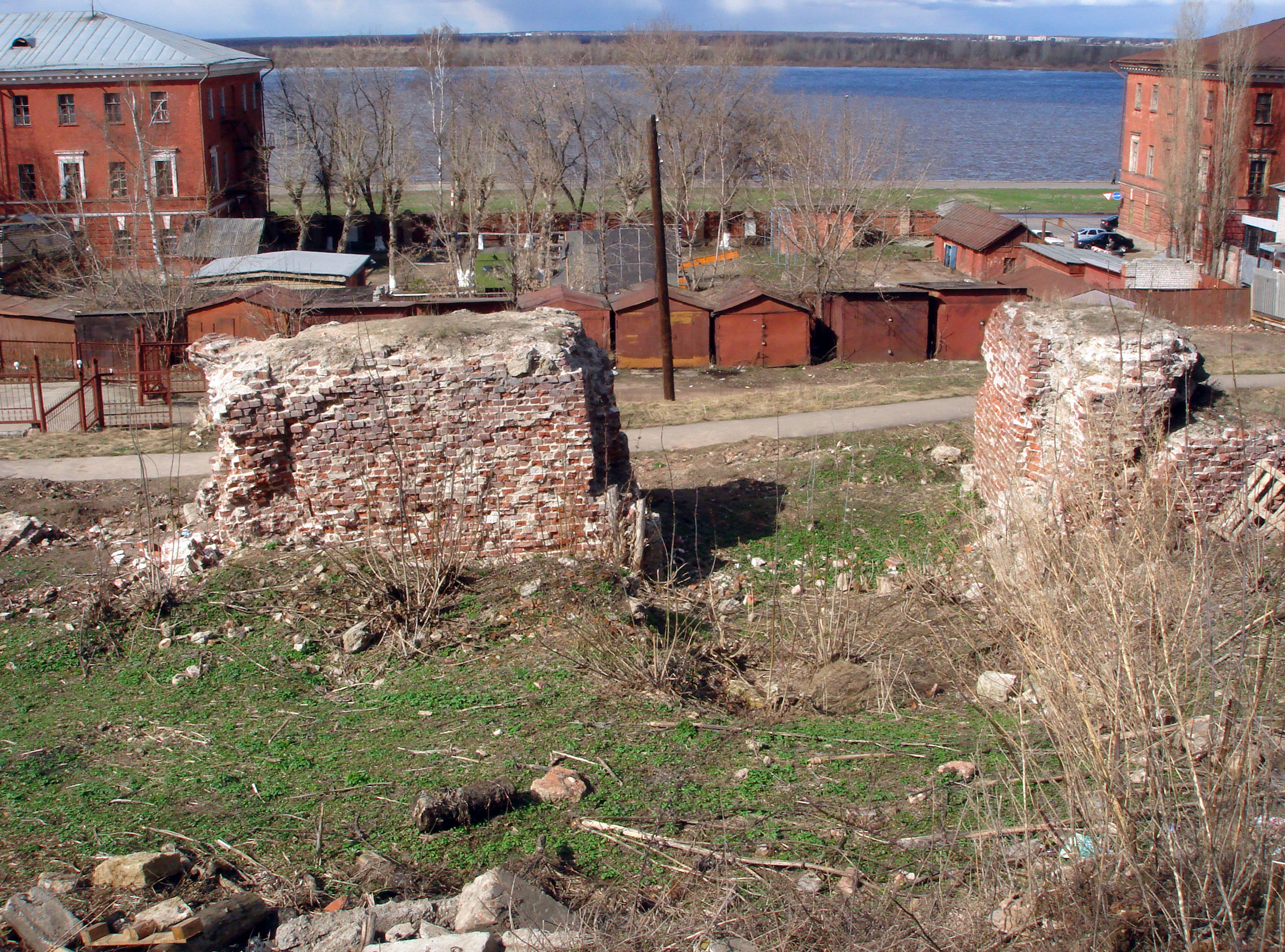 Руины Зачатской башни Нижегородского Кремля